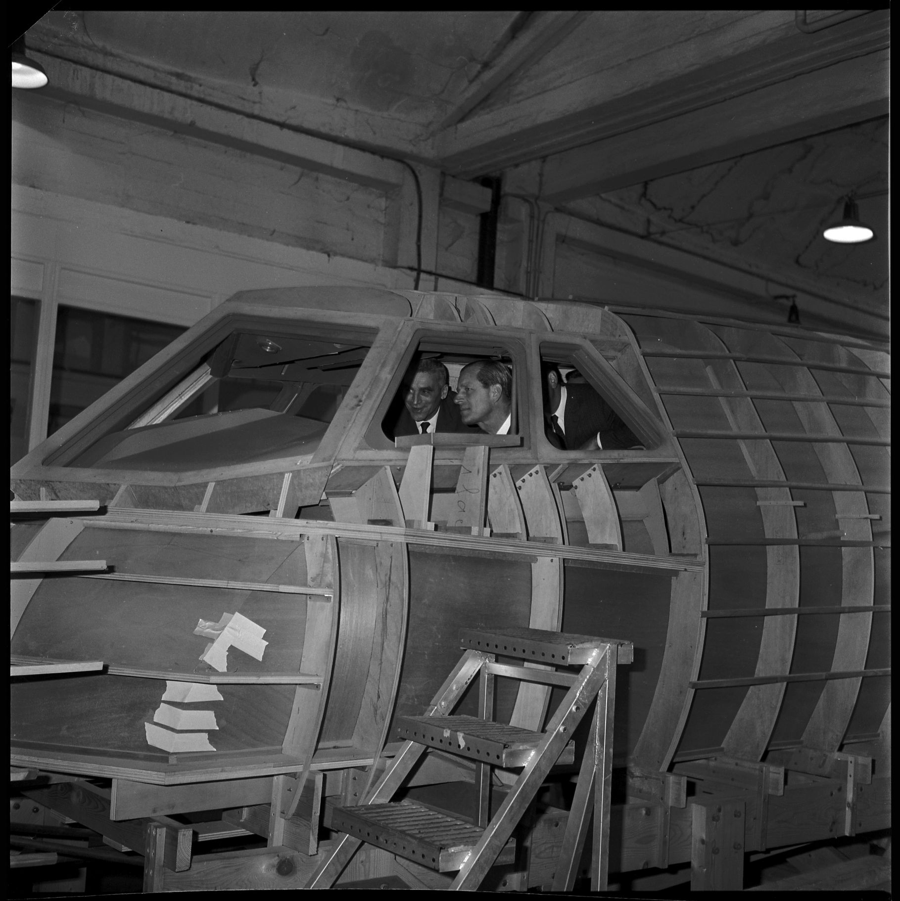 Sud Aviation. 4 et 5 Novembre 1965. Vue du prince Philip d'Angleterre et de Lucien Servanty visitant un cockpit (prototype en bois ? simulateur ?).